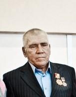 Николай Иванович Свиридов в 2016 году